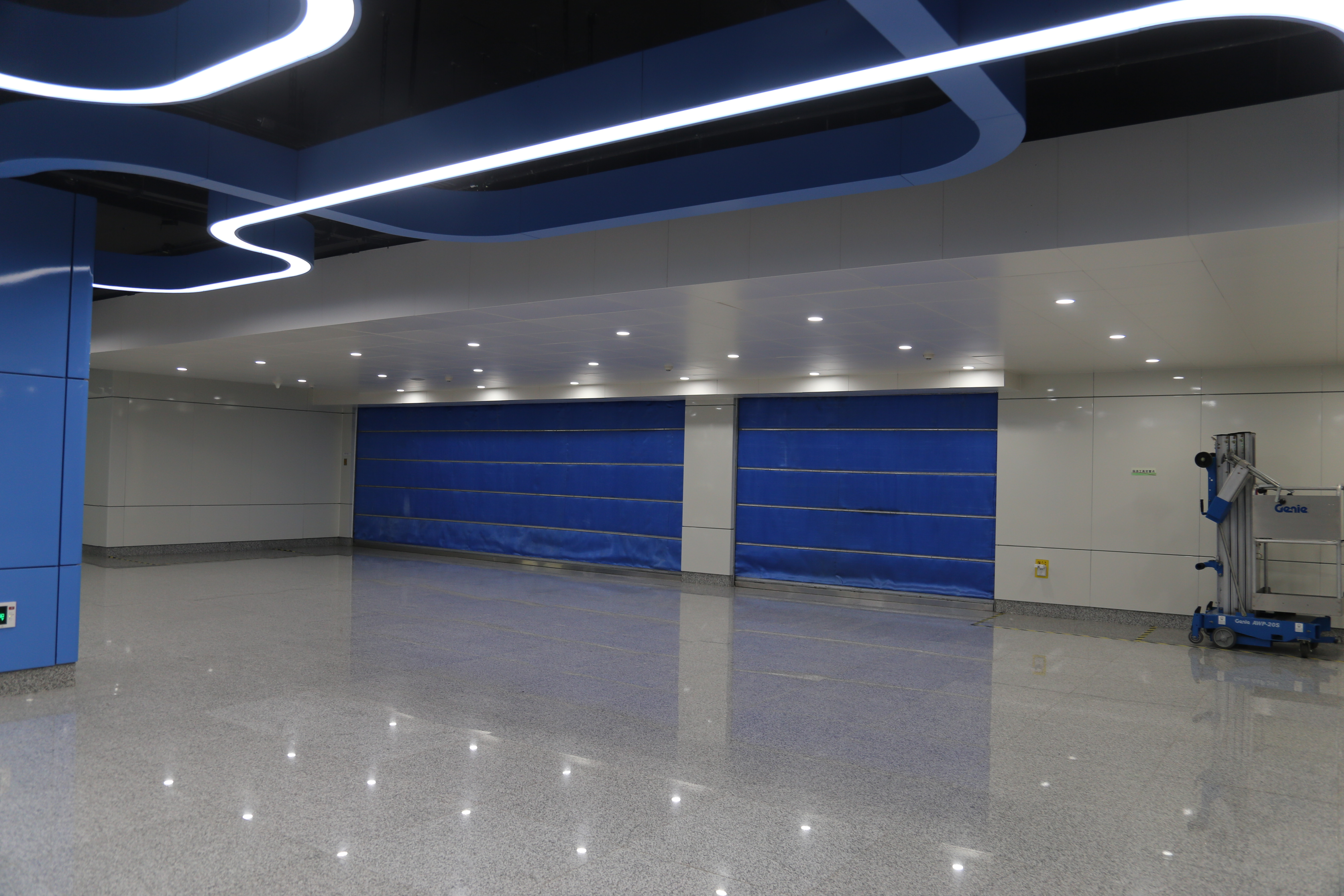 宁波火车站2/4换乘通道预留